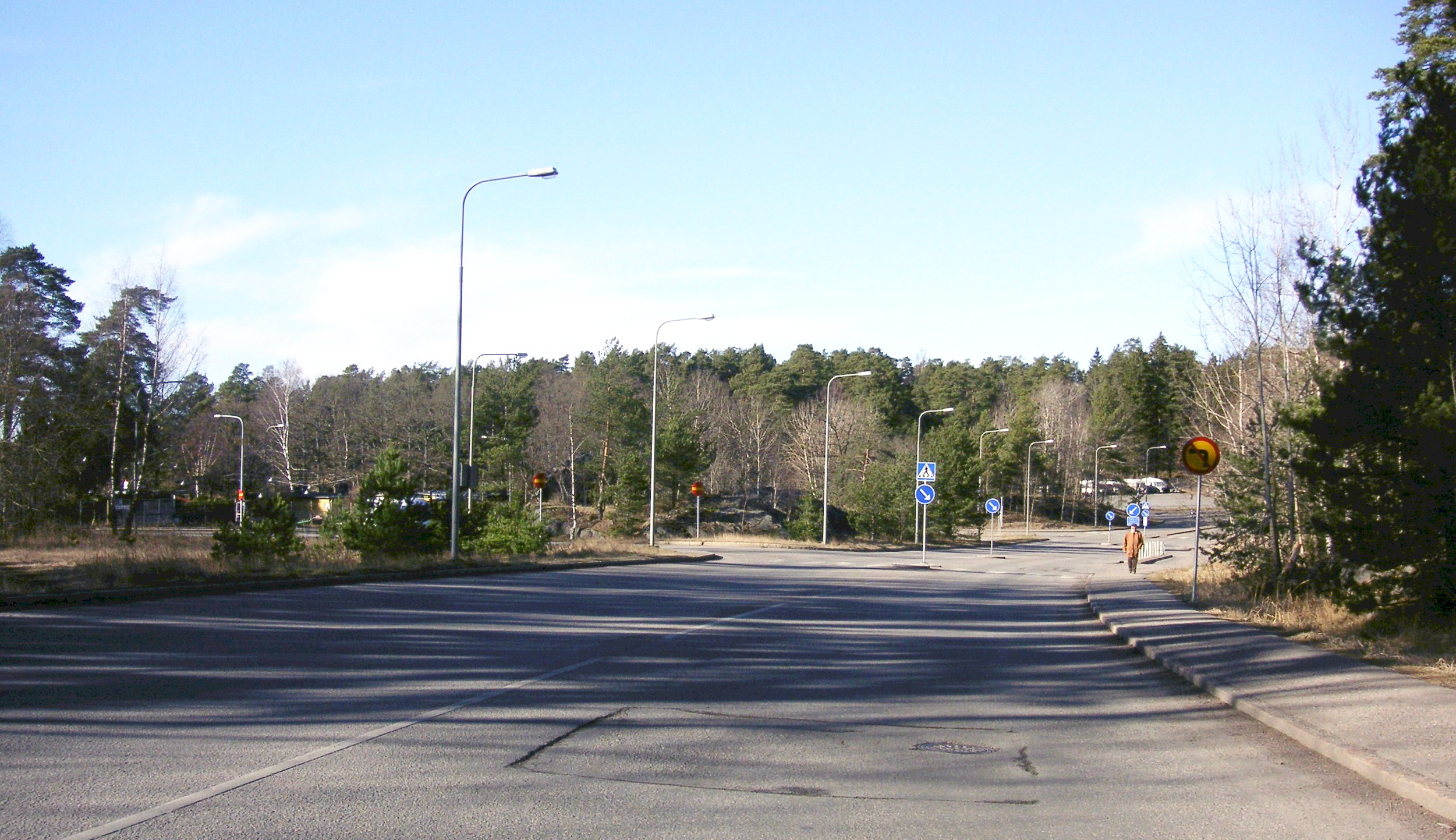 Flatenvägen vid Flatenbadet i Stockholm